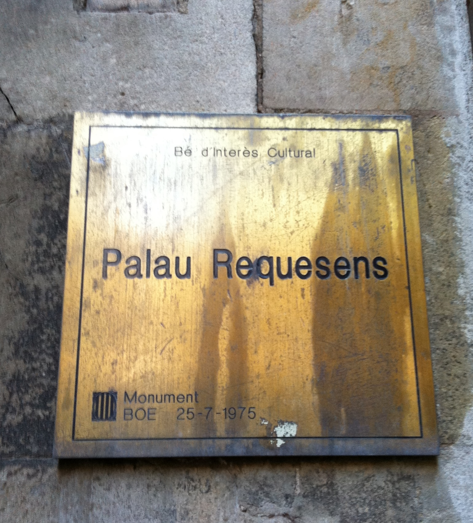 Palau Requesens